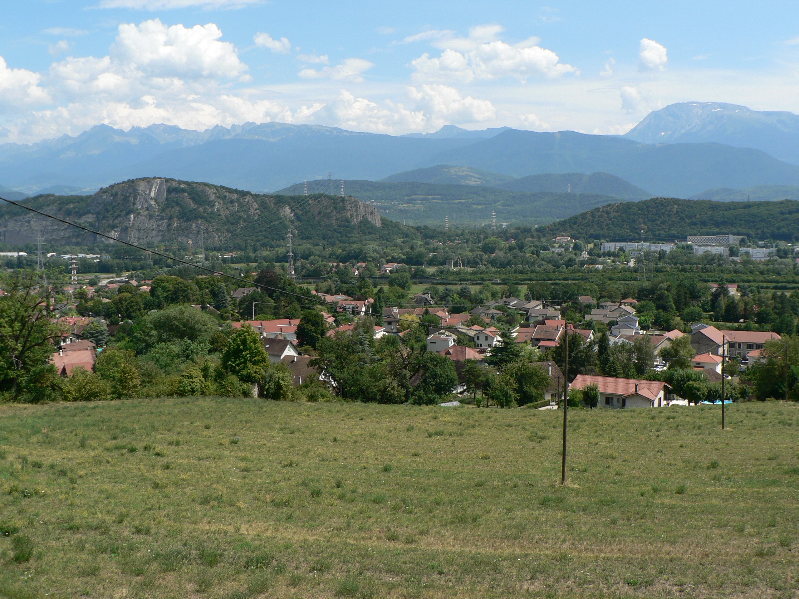 Vue générale d'Allières. Varces-Allières-Risset, Isère, AuRA, France.